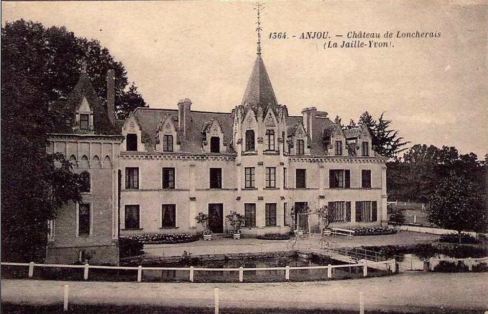 Carte postale, 1364. - Anjou - Château de Loncherais (La Jaille-Yvon)